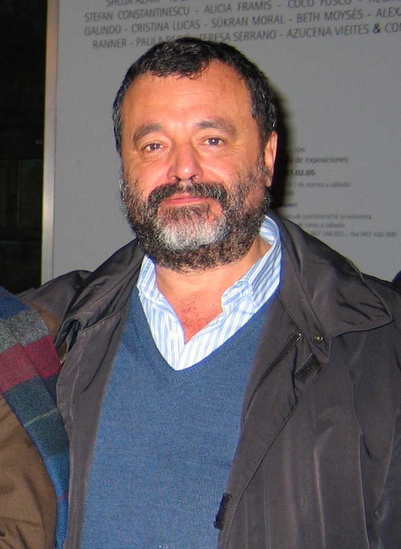 Manuel Aznar kritikaria 2011an, Donostian.